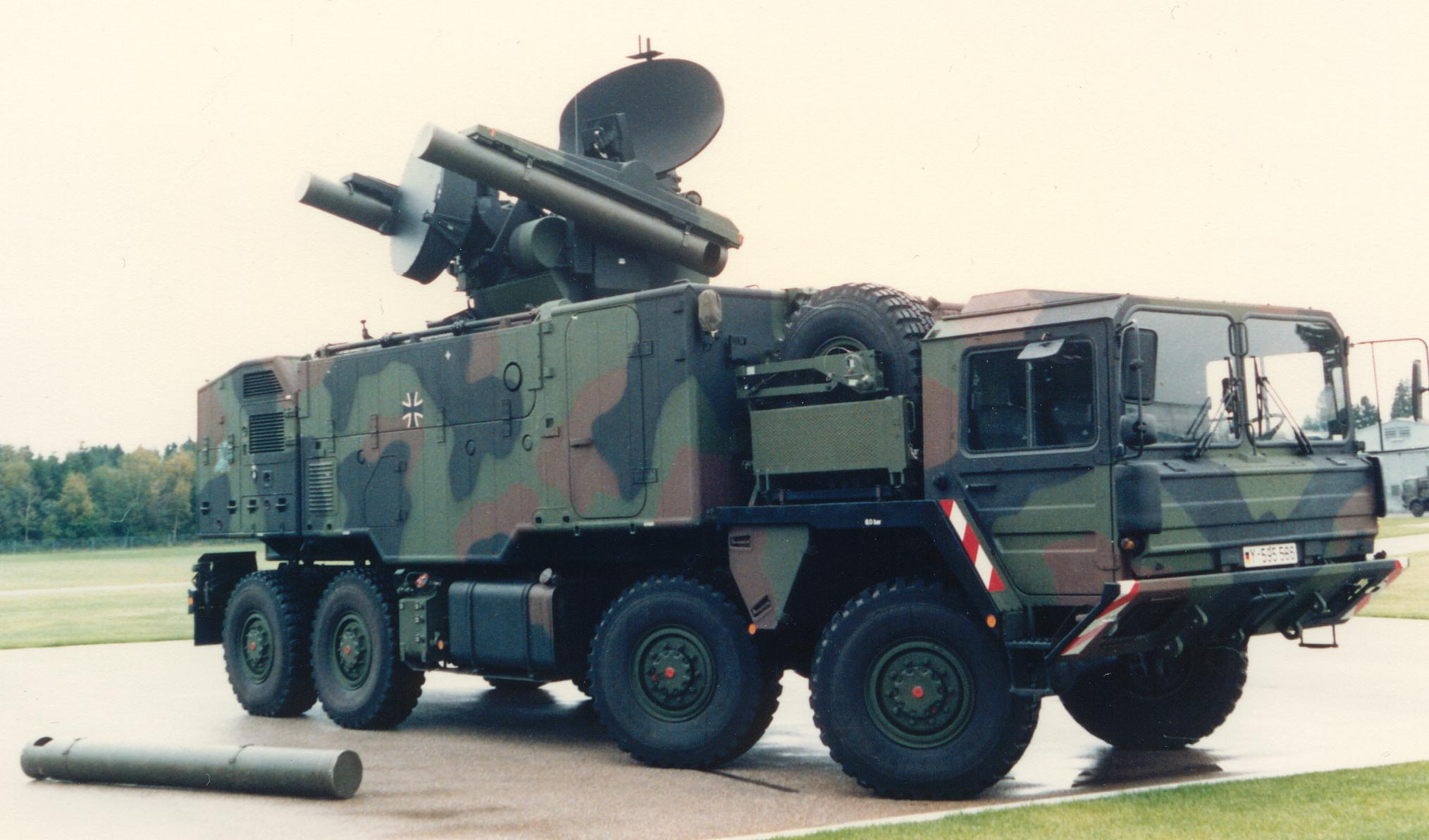 Waffensystem Roland auf Lkw 15 t (FlaRakRad).